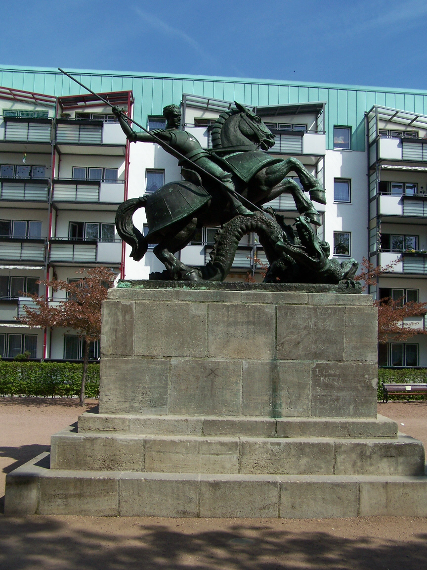 Eisenach (Germany), St. Georg by Erich Windbichler